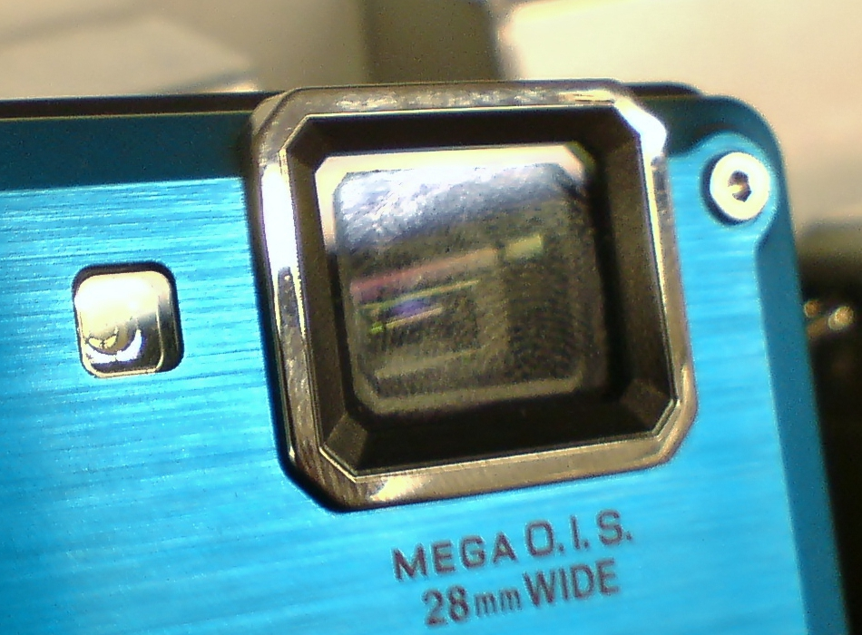 Objectif non protégé d'un Lumix FT1 recouvert de traces de doigt.